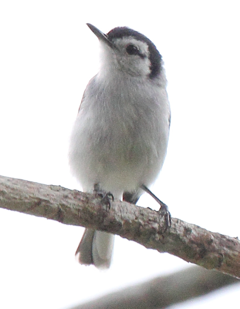 Tropical Gnatcatcher (Polioptila plumbea), Belize